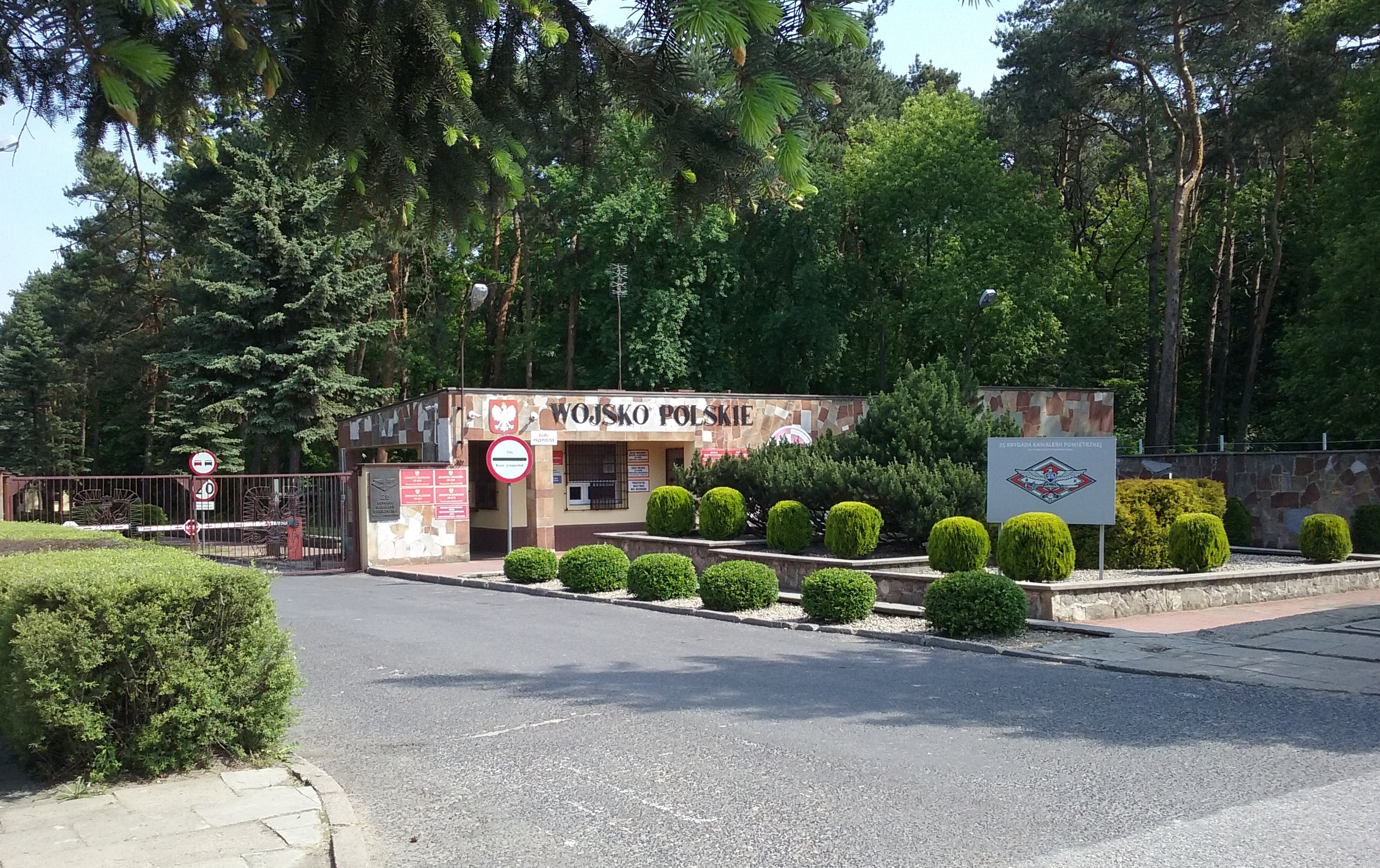 Jednostka Wojskowa w Tomaszowie Mazowieckim, PL, EU.CC0